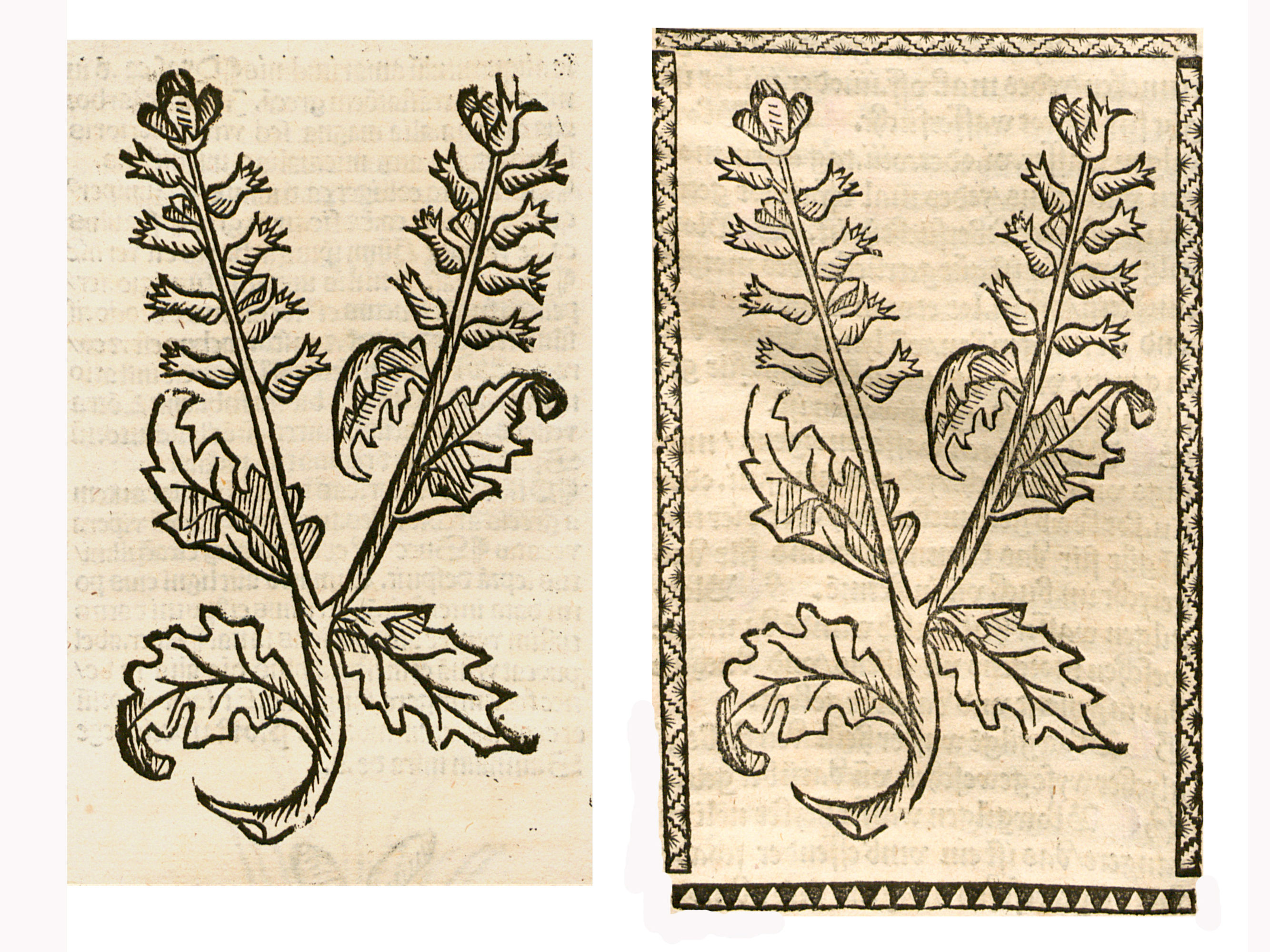 Abbildung von: Bilsenkraut